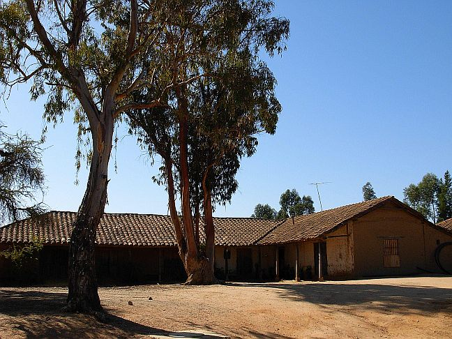 Quebrada de Marchigüe